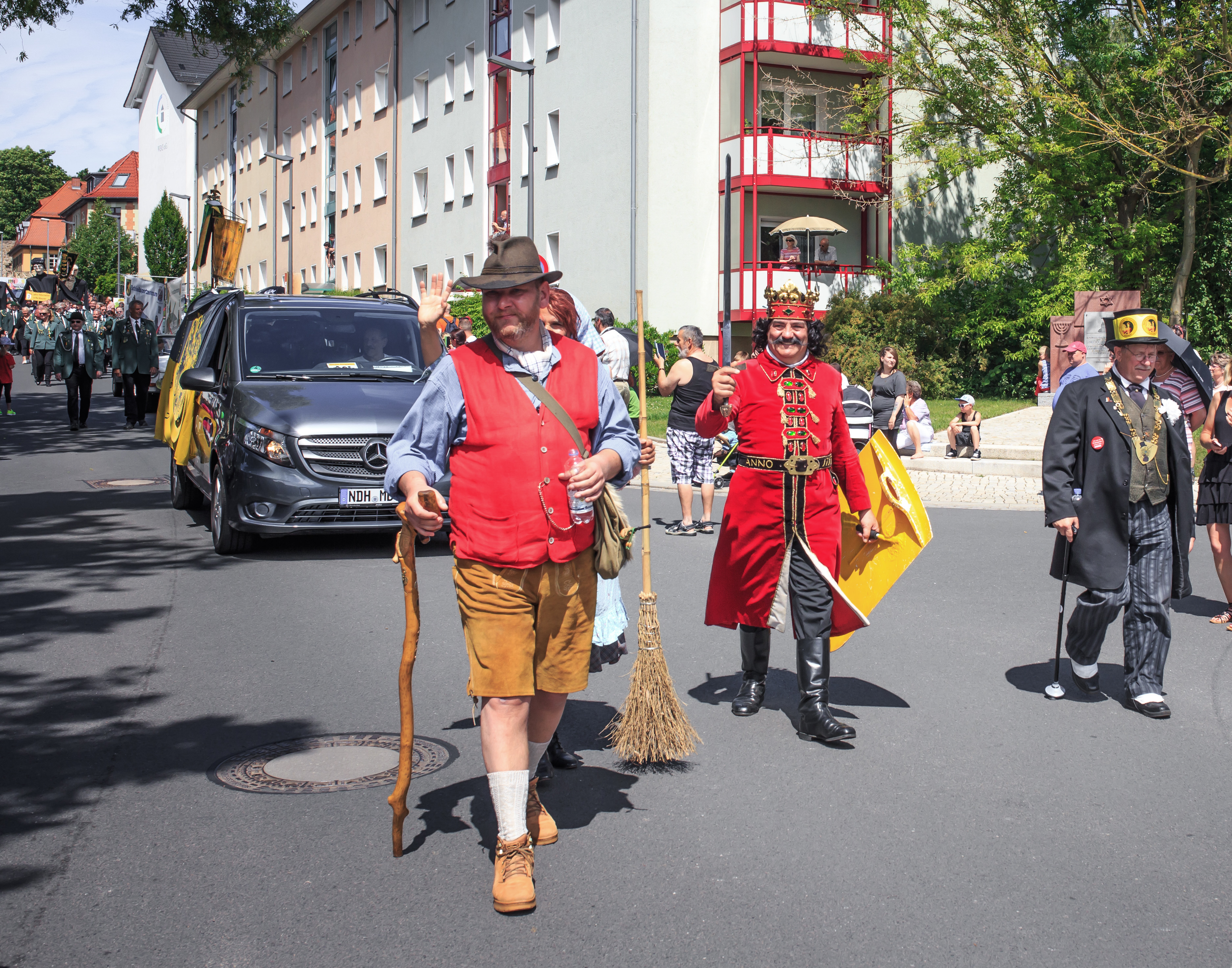 Die Rolandgruppe beim Rolandsfest 2017